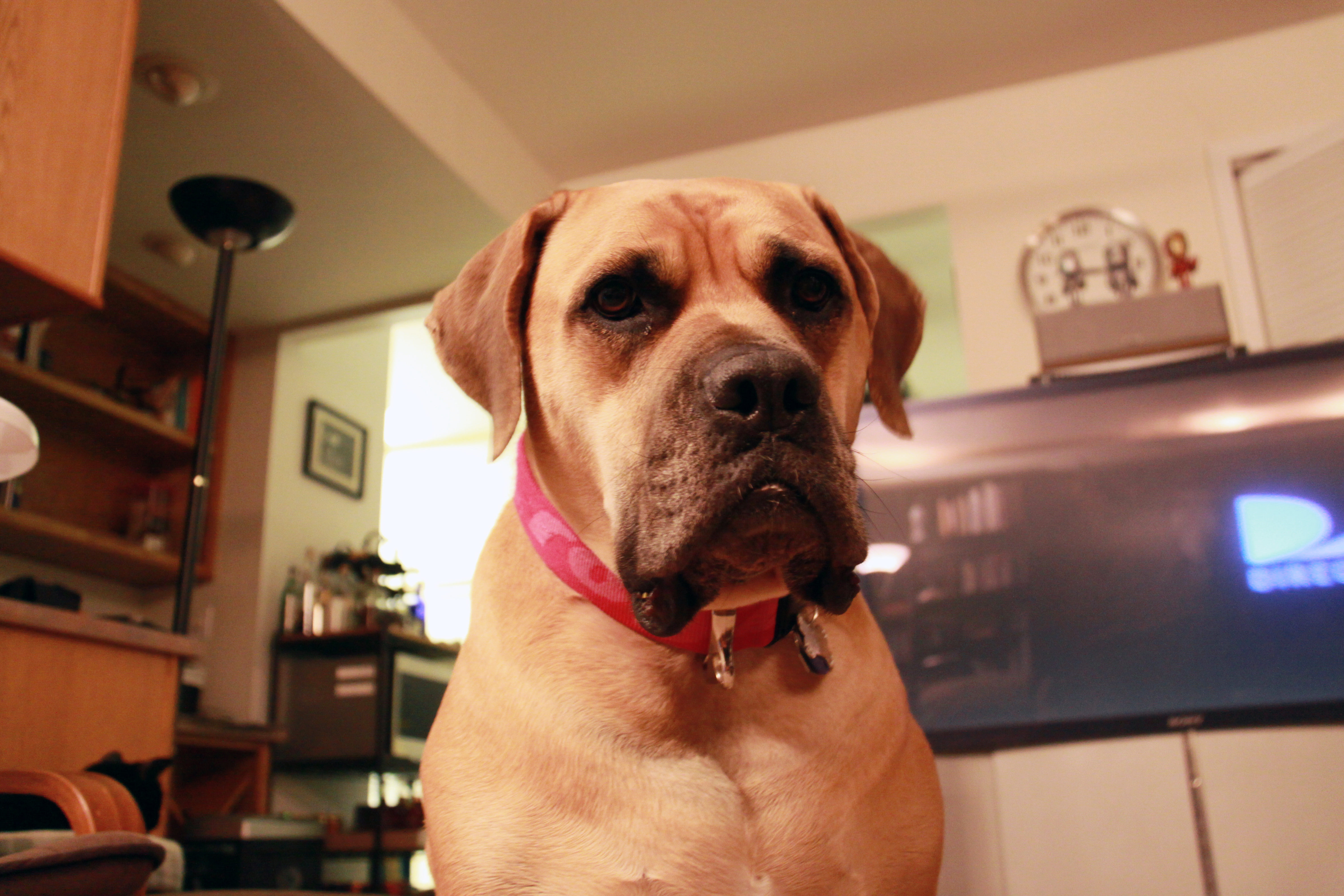 Lionshead Josie Fee Boerboel